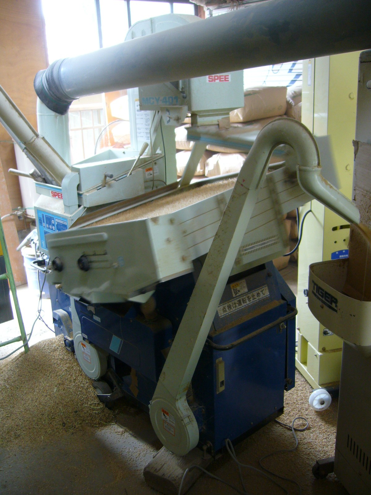 rice-husks-machine,katori-city,japan